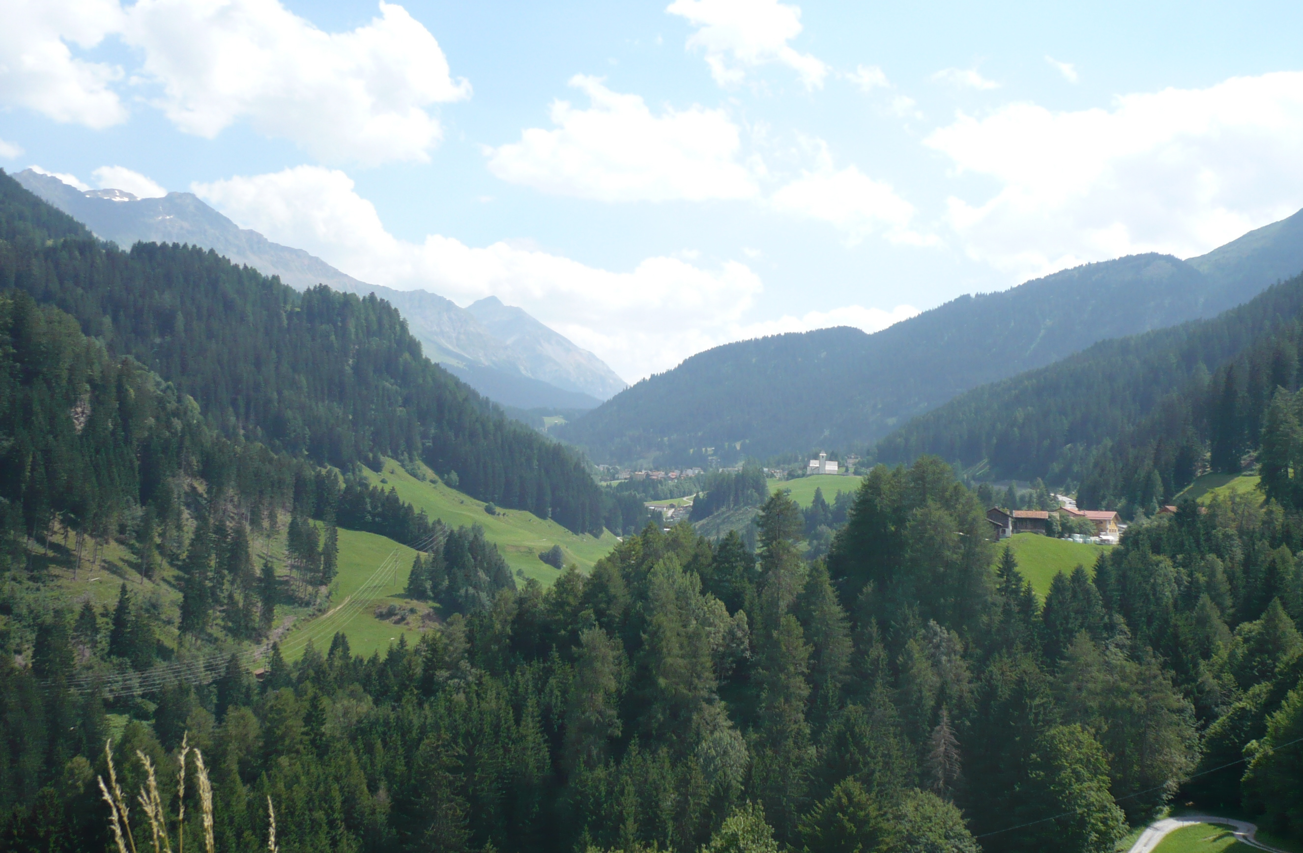 Churwaldental Richtung Norden